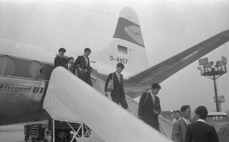 Besuch japanischer Schüler in der Bundesrepublik Ankunft am Flughafen Wahn